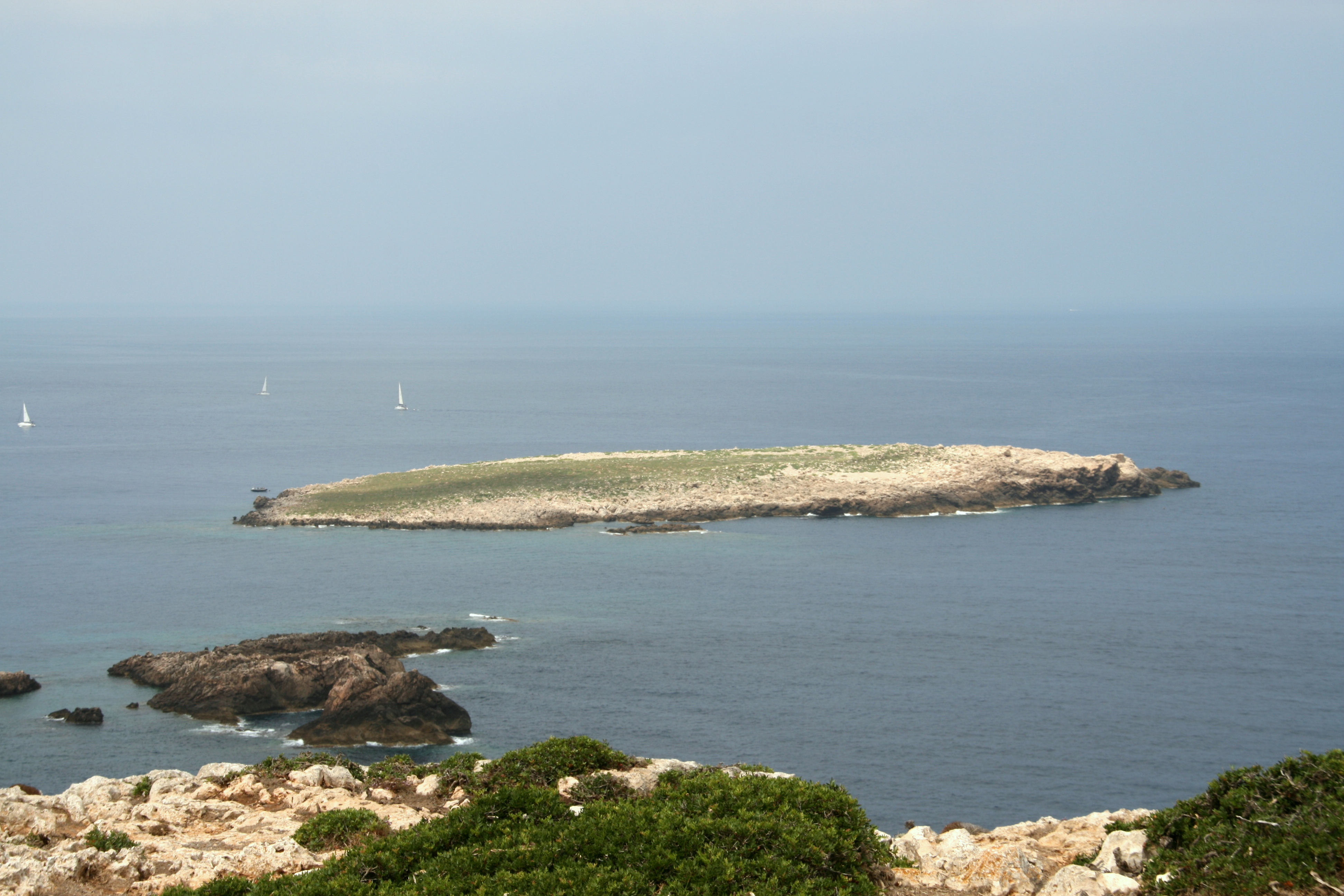 Illa de Sanitja o dels Porros. En primer plano, Illot des Pas This is a photography of a Site of Community Importance in Spain with the ID: ES0000231. Natura2000 entry, EEA entry This is a photography of a Site of Community Importance in Spain with the ID: ES5310035. Natura2000 entry, EEA entry